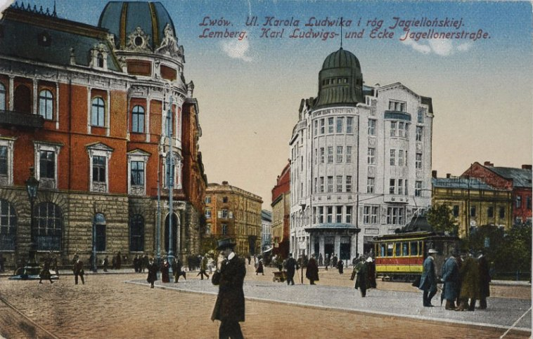 Львів, вул Кароля Людвіка і ріг вул. Ягеллонської. Поштівка. 1916 р.